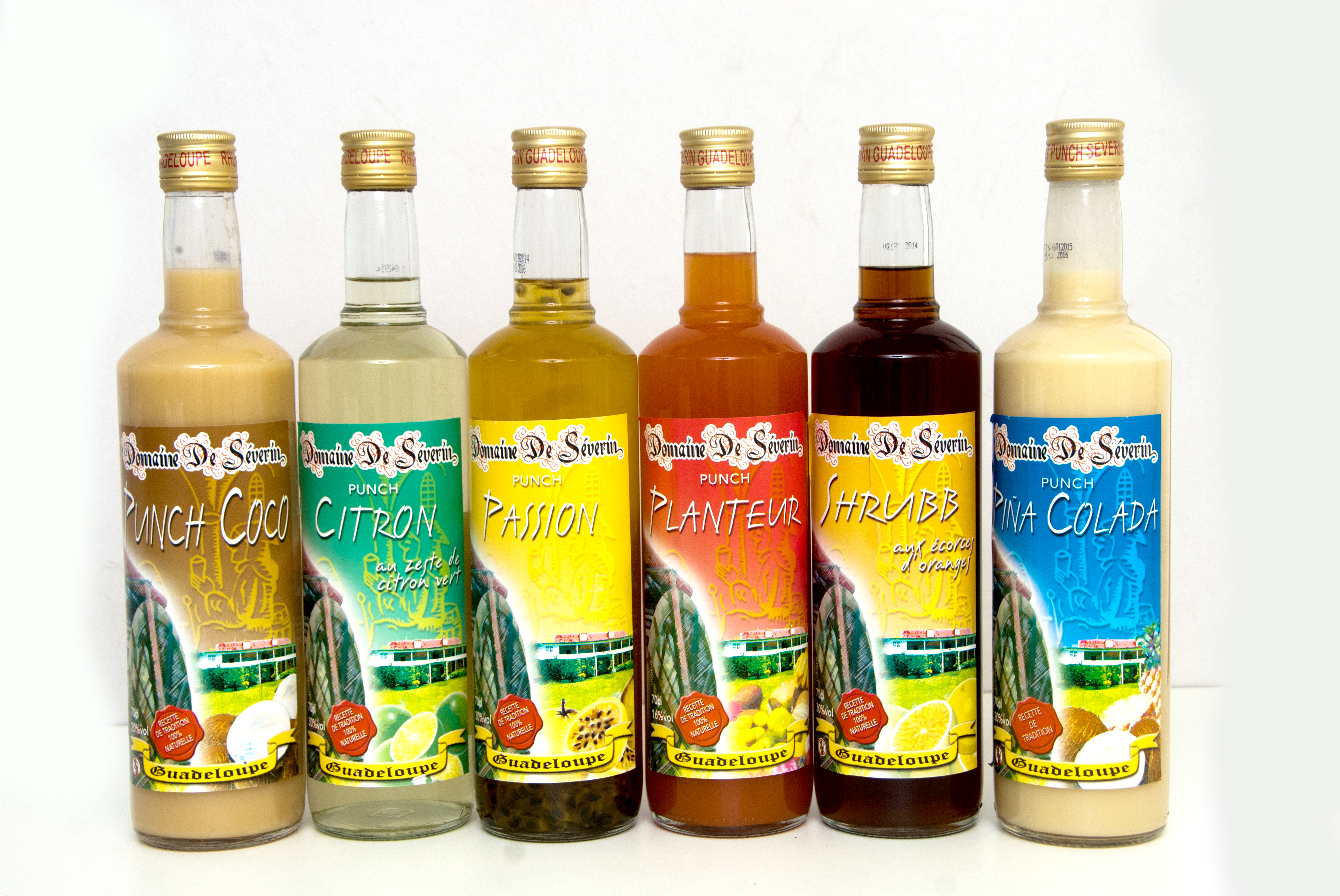 Gamme de punchs de la Distillerie Séverin, GUADELOUPE, F.W.I. Fabriqués encore de manière artisanale avec de vrais fruits et au rhum blanc agricole et/ou rhum vieux agricole